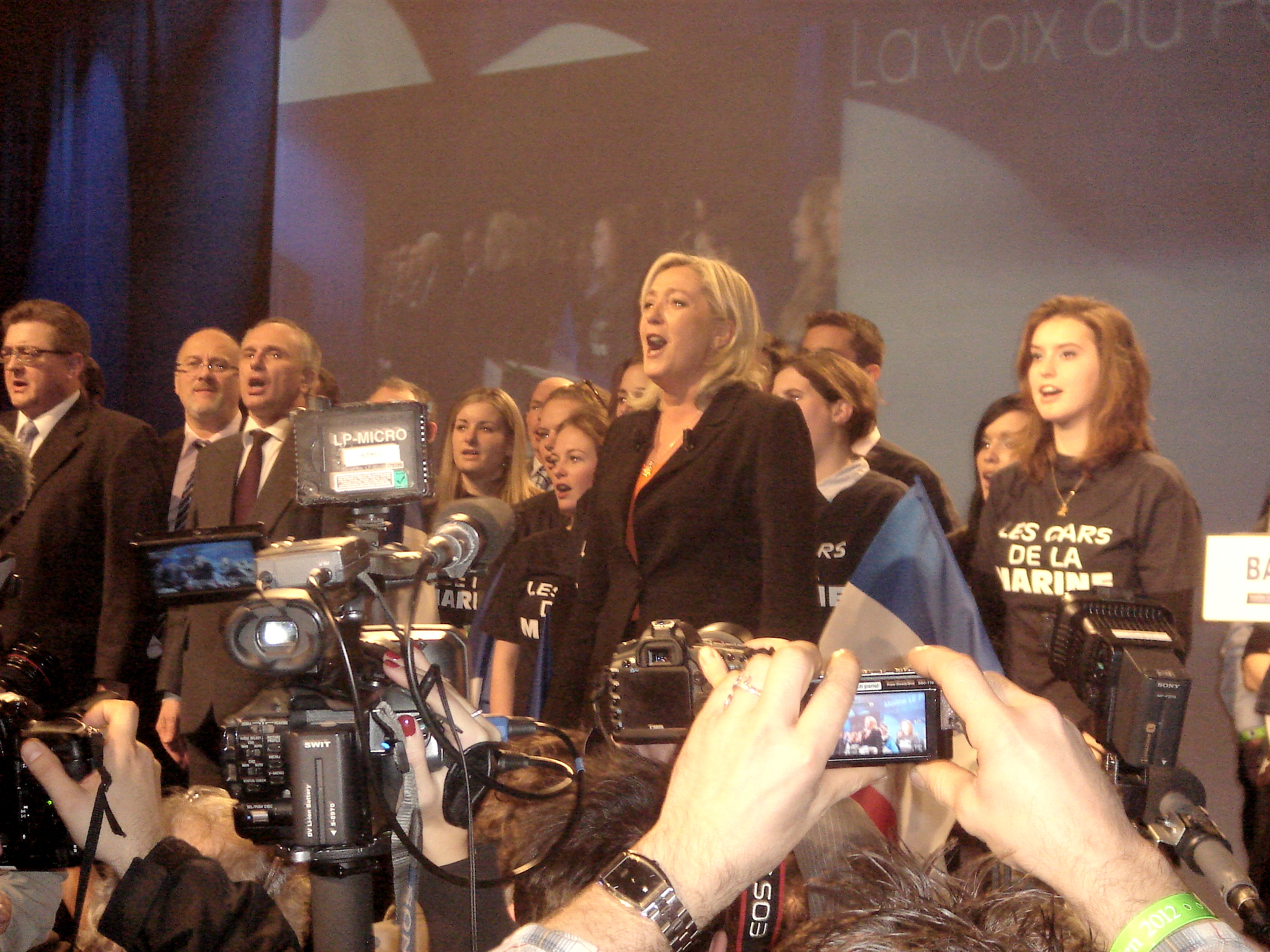 Présentation du programme présidentiel de Marine Le Pen, samedi 19 novembre 2011, Banquet des mille, salle Équinoxe, Paris. Marine Le Pen chantant la Marseillaise. Autres personnalités à identifier.